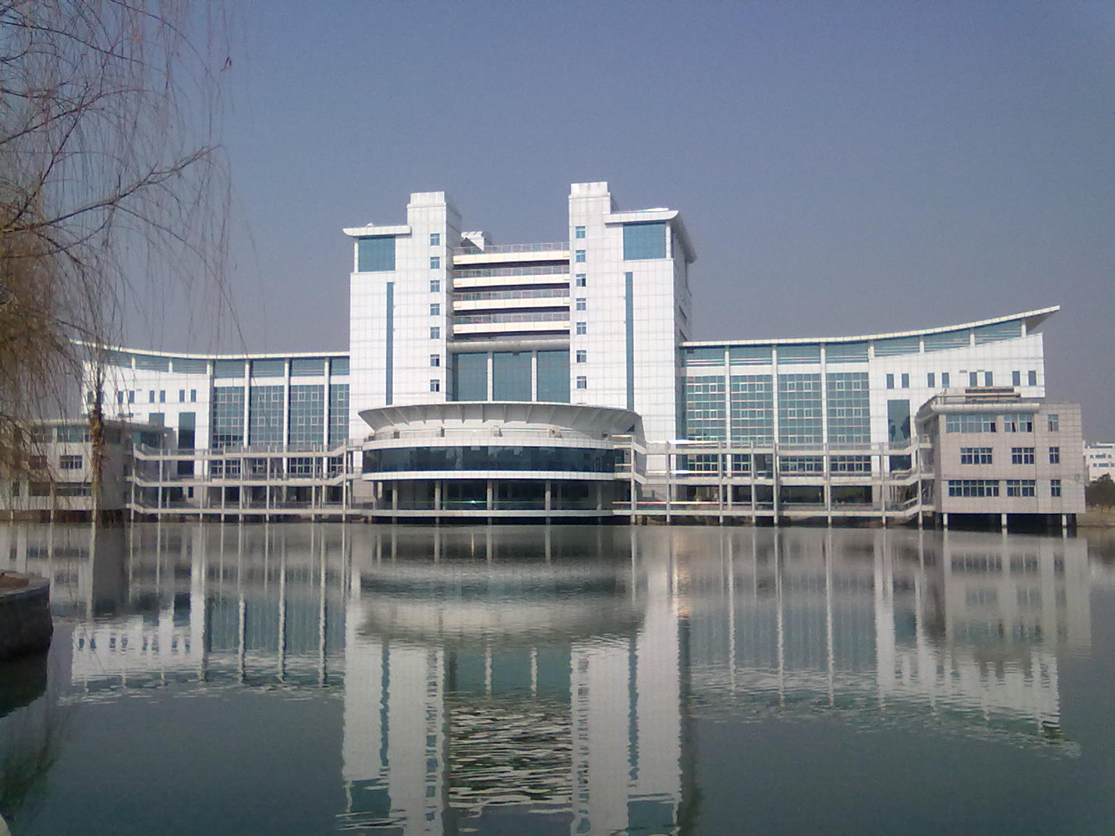 孝感学院